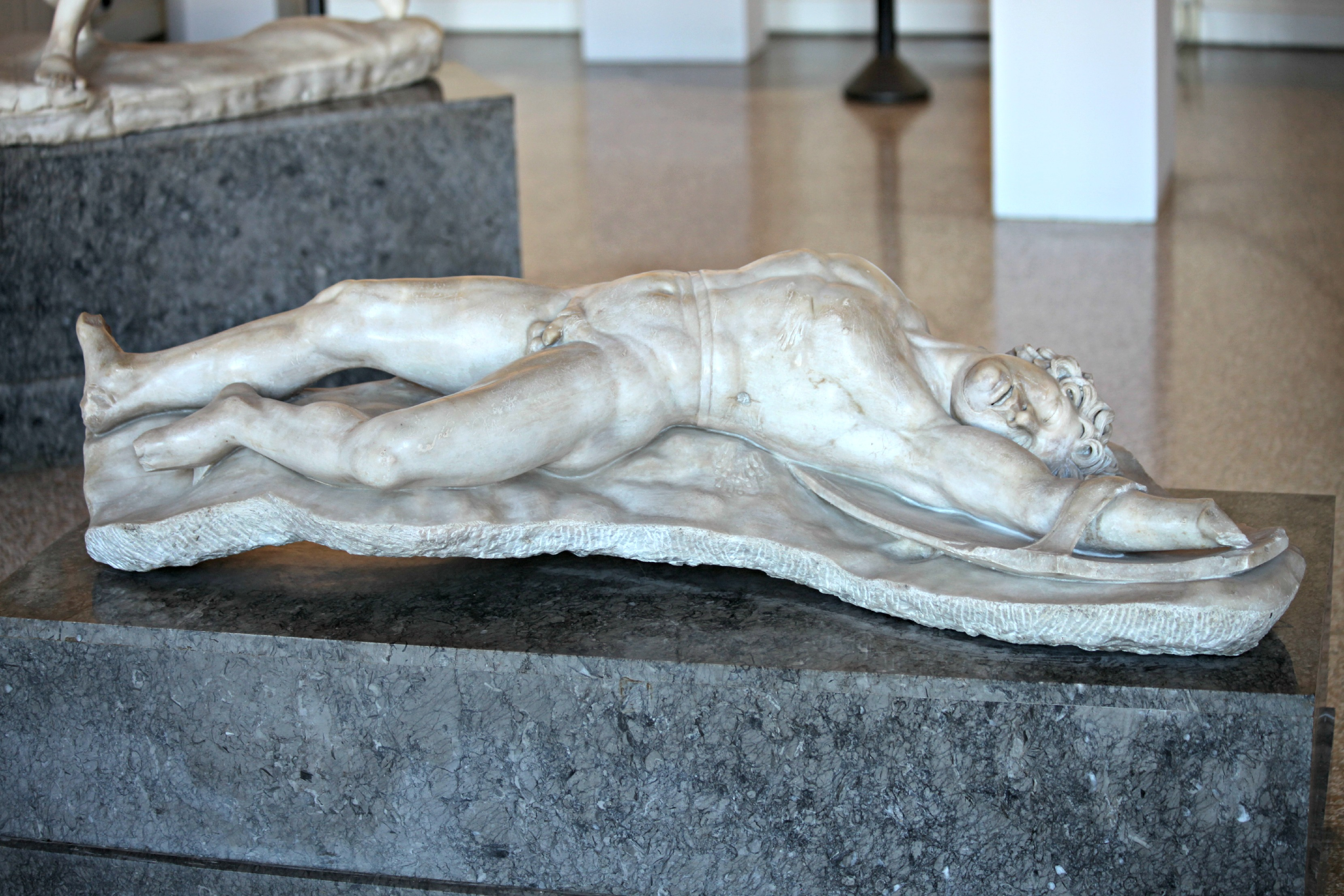 Museo Archeologico Nazionale - MIBAC This is a photo of a monument which is part of cultural heritage of Italy.